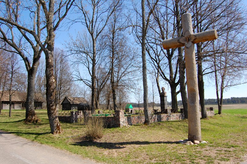 Maleišiai (Anykščiai), Vaižganto gimtinė.